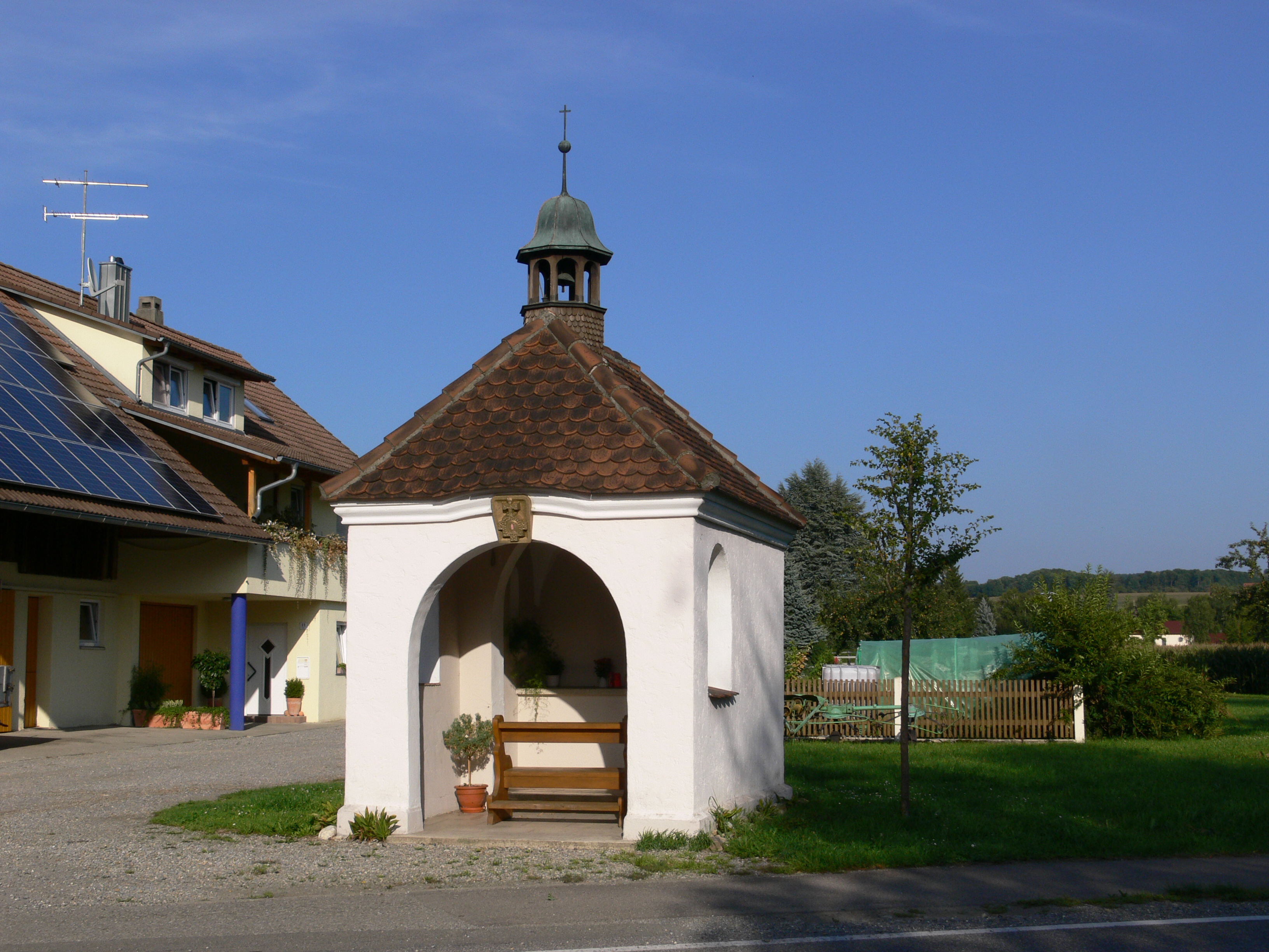 Baienfurt, Landkreis Ravensburg Wegkapelle im Ortsteil Hof